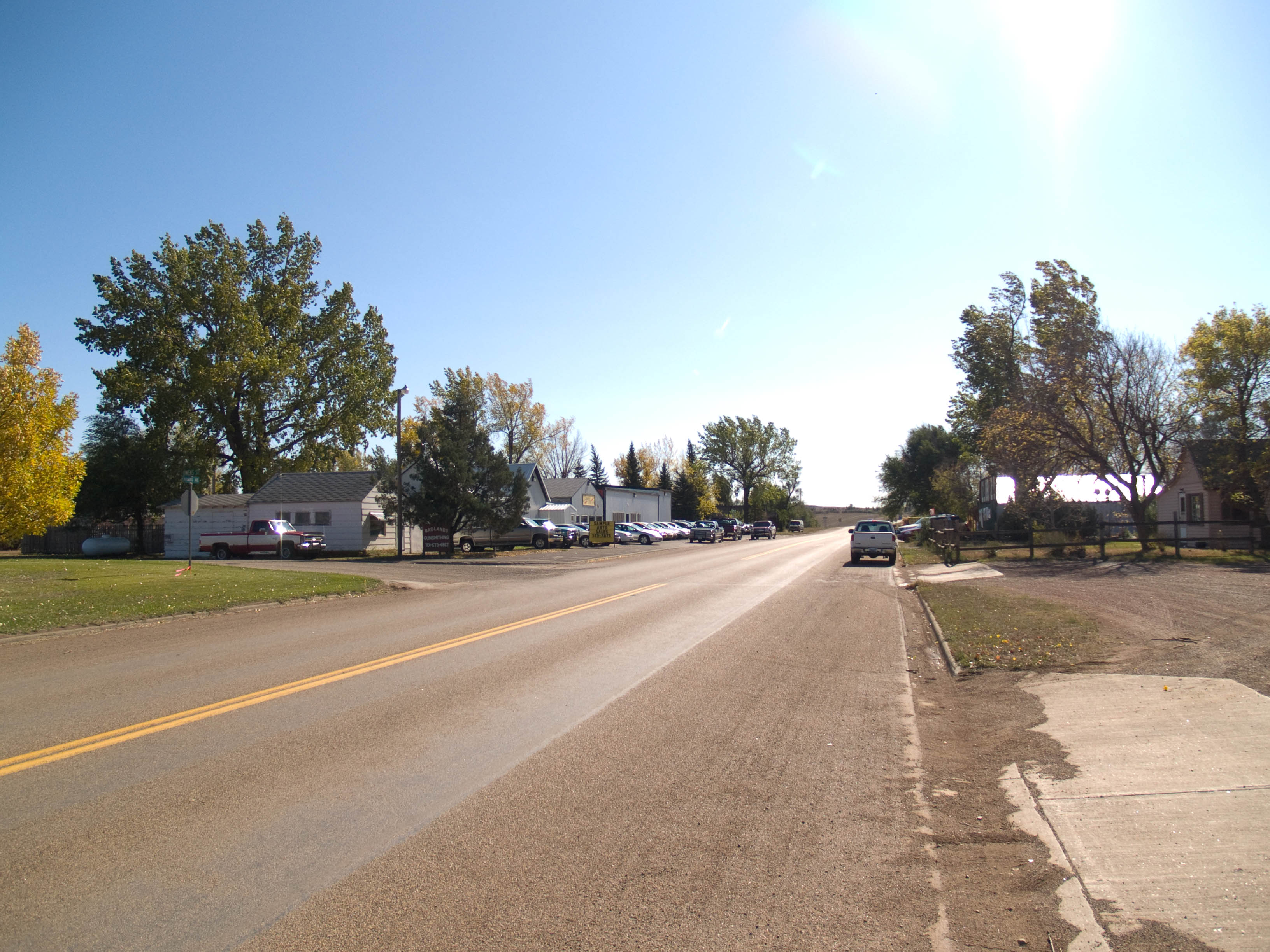 Manning, North Dakota